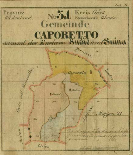 historische Landkarte: Skizze (Crocquis) der Urmappenkopie der Gemeinde Caporetto (Kobarid, Karfreit) in Görz